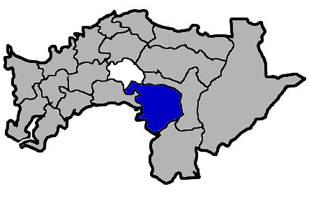 KaurJmeb為編輯中華民國臺灣省嘉義縣中埔鄉，於2005年2月10日所繪。